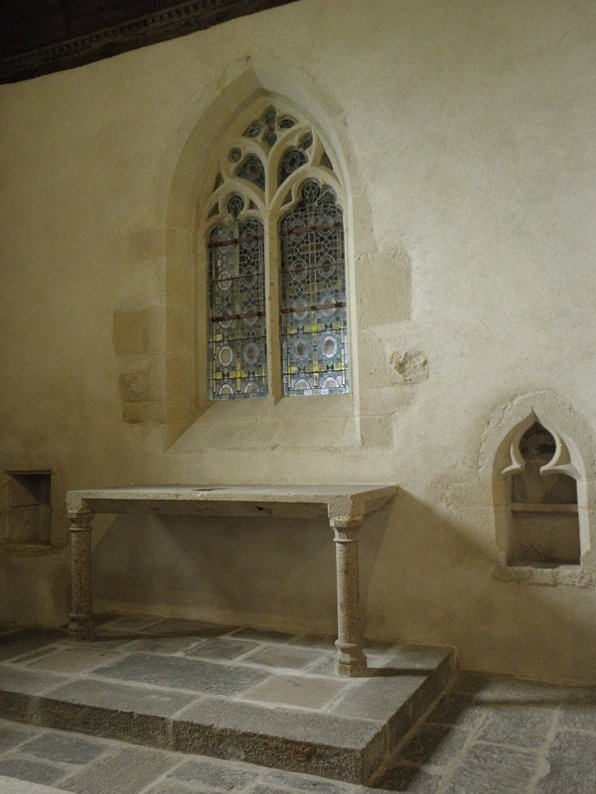 Mur oriental et autel de la chapelle des Pontbriand en l'ancienne église de Saint-Lunaire (35).